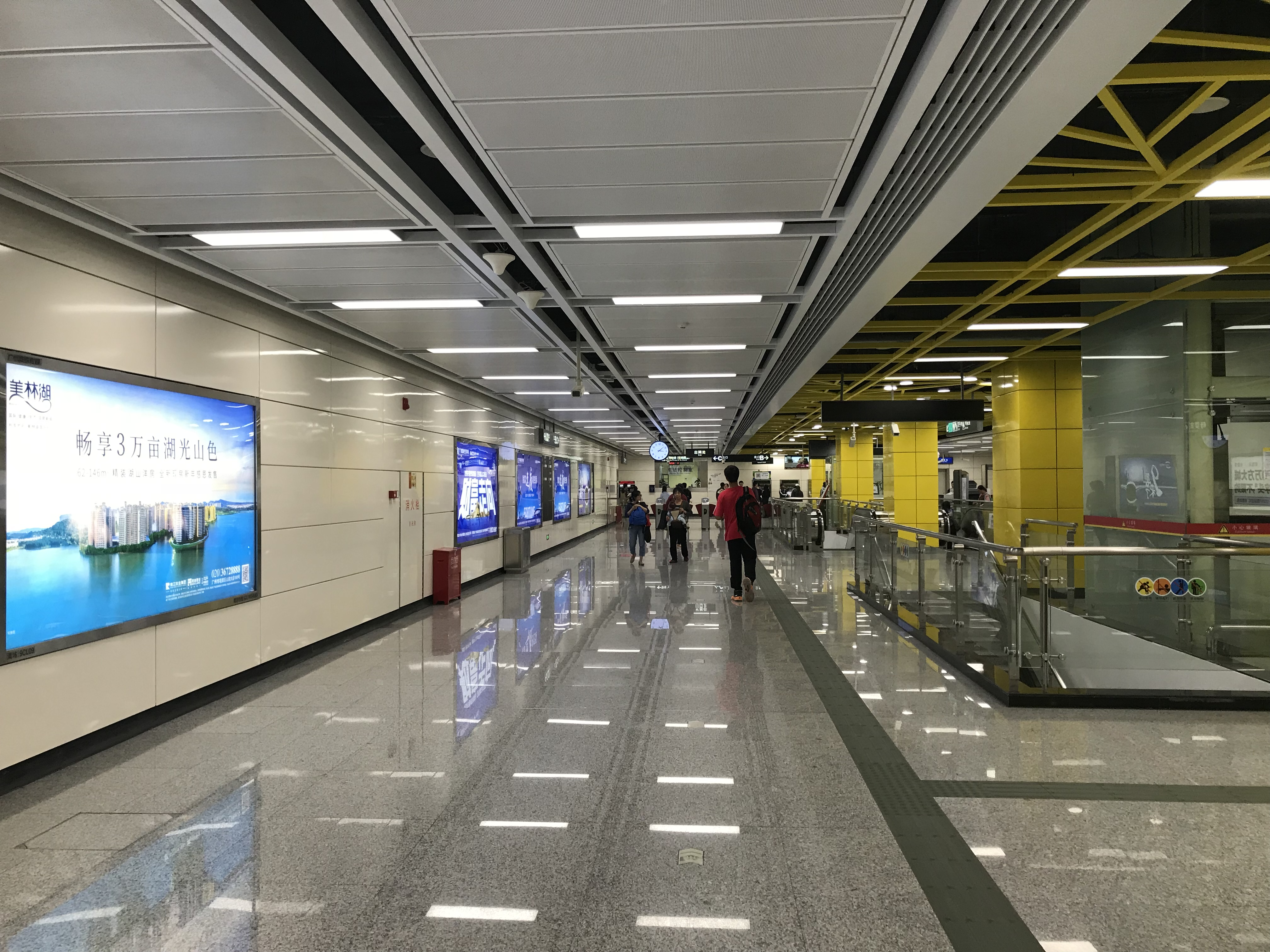 广州地铁清㘵站